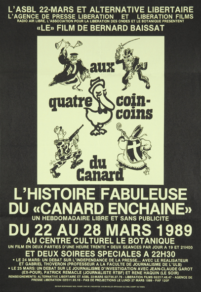 "Aux 4 coin-coins du Canard", un film documentaire de Bernard Baissat sur le "Le Canard enchaîné", 1987.